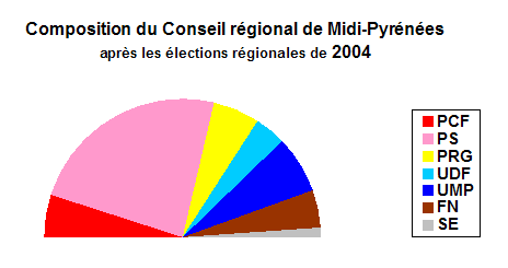 Composition du conseil régional de Midi-Pyrénées après les élections régionales de 2004